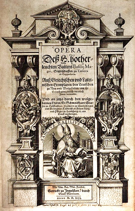 Schweikhard von Helfenstein, Titelblatt seiner "Werke des Hl. Basilius", 1595